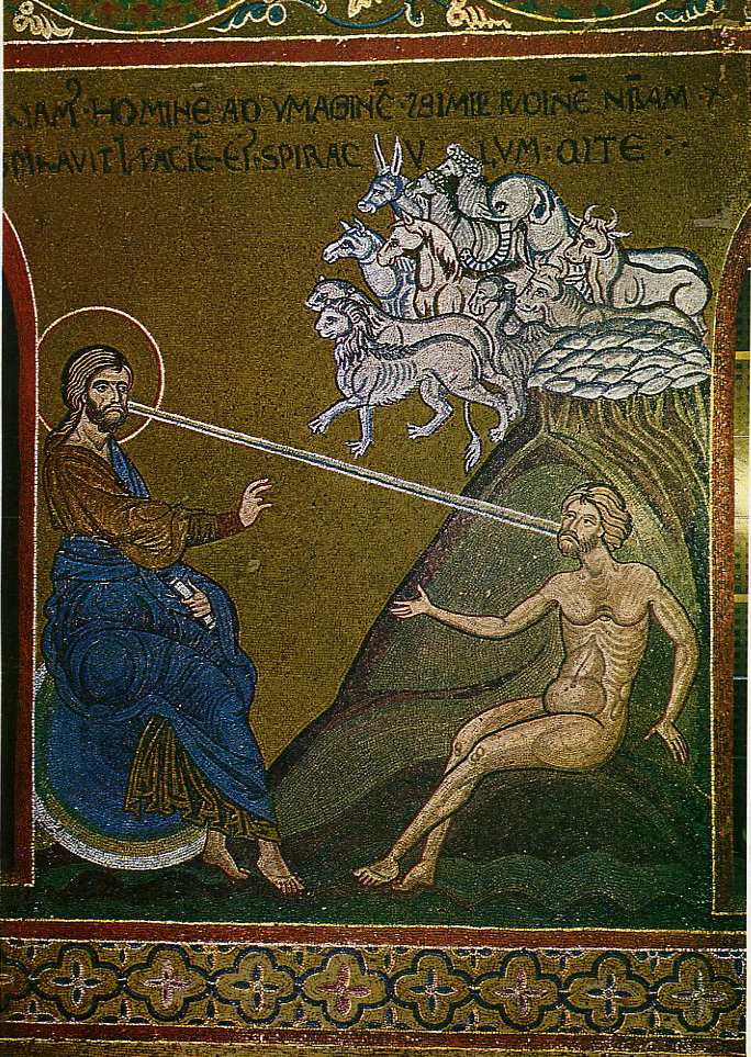 Creation of Adam. После сотворения земли, Бог создает человека и оживляет его. Byzantine mosaic in Monreale